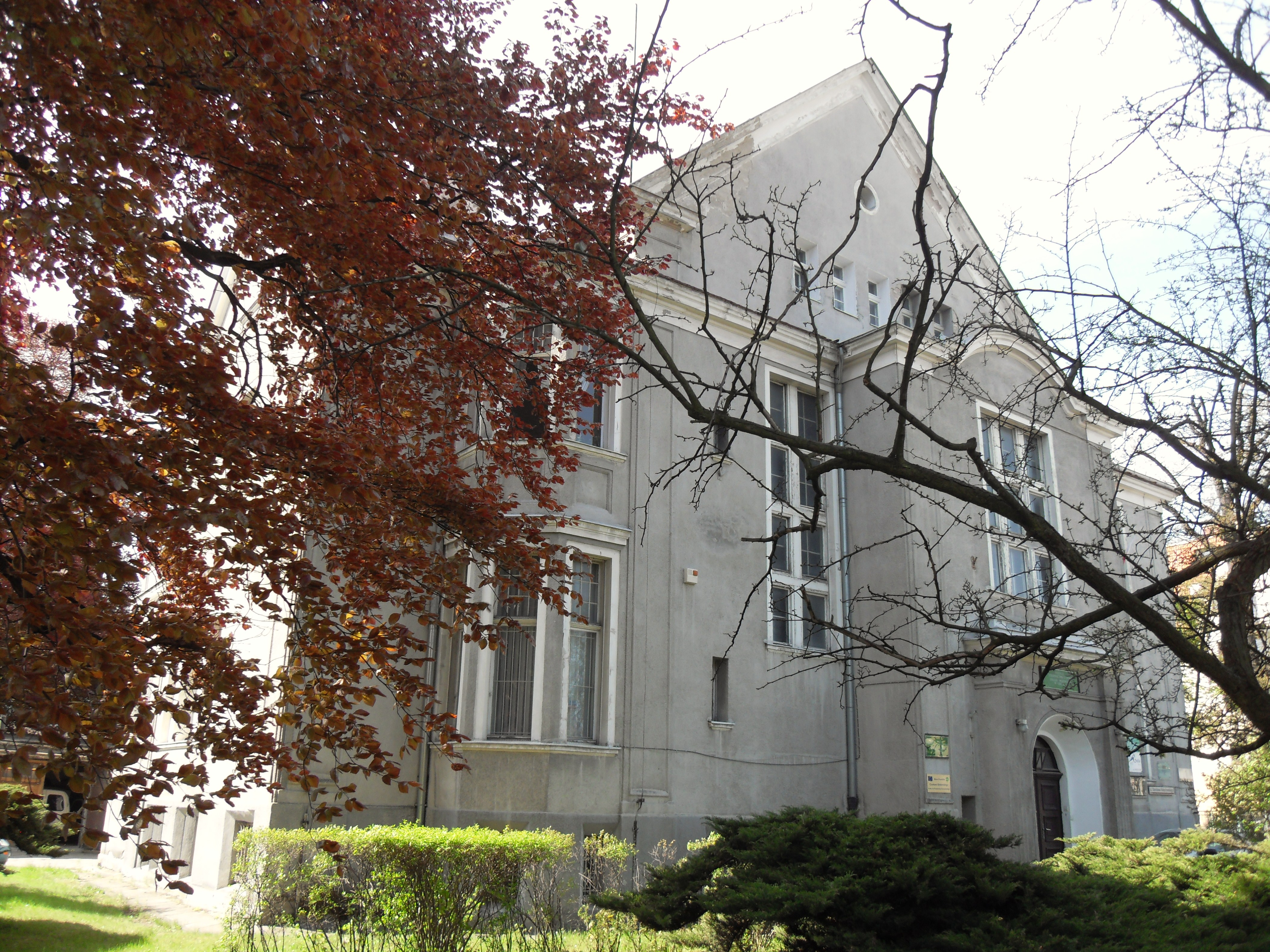 Gdańsk Wrzeszcz Górny, ul. Małachowskiego 1 - willa, 1910 (tył willii)